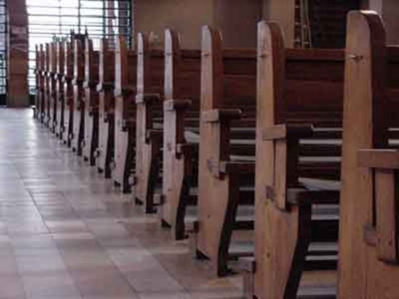 Pasaréti templom padsora, Budapest II.